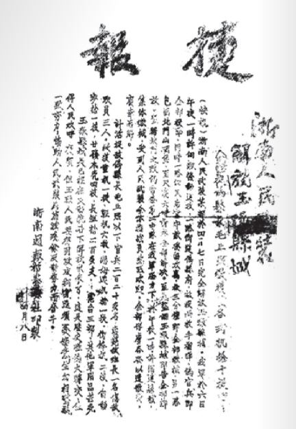 中文（中国大陆）: 1949年4月8日，中共浙南特委发的解放玉环捷报